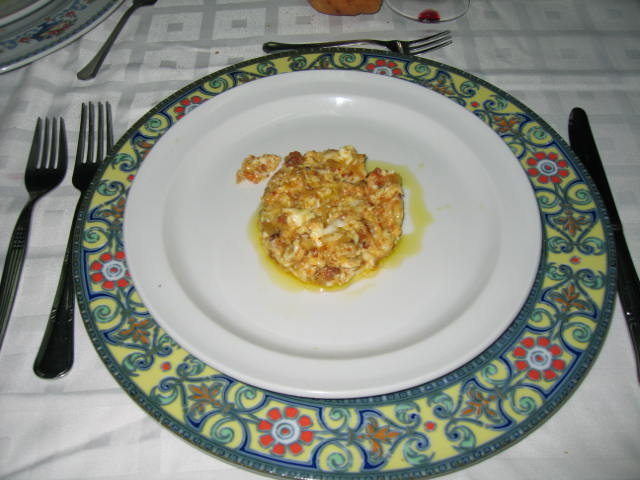 Revuelto de merluza y oricios